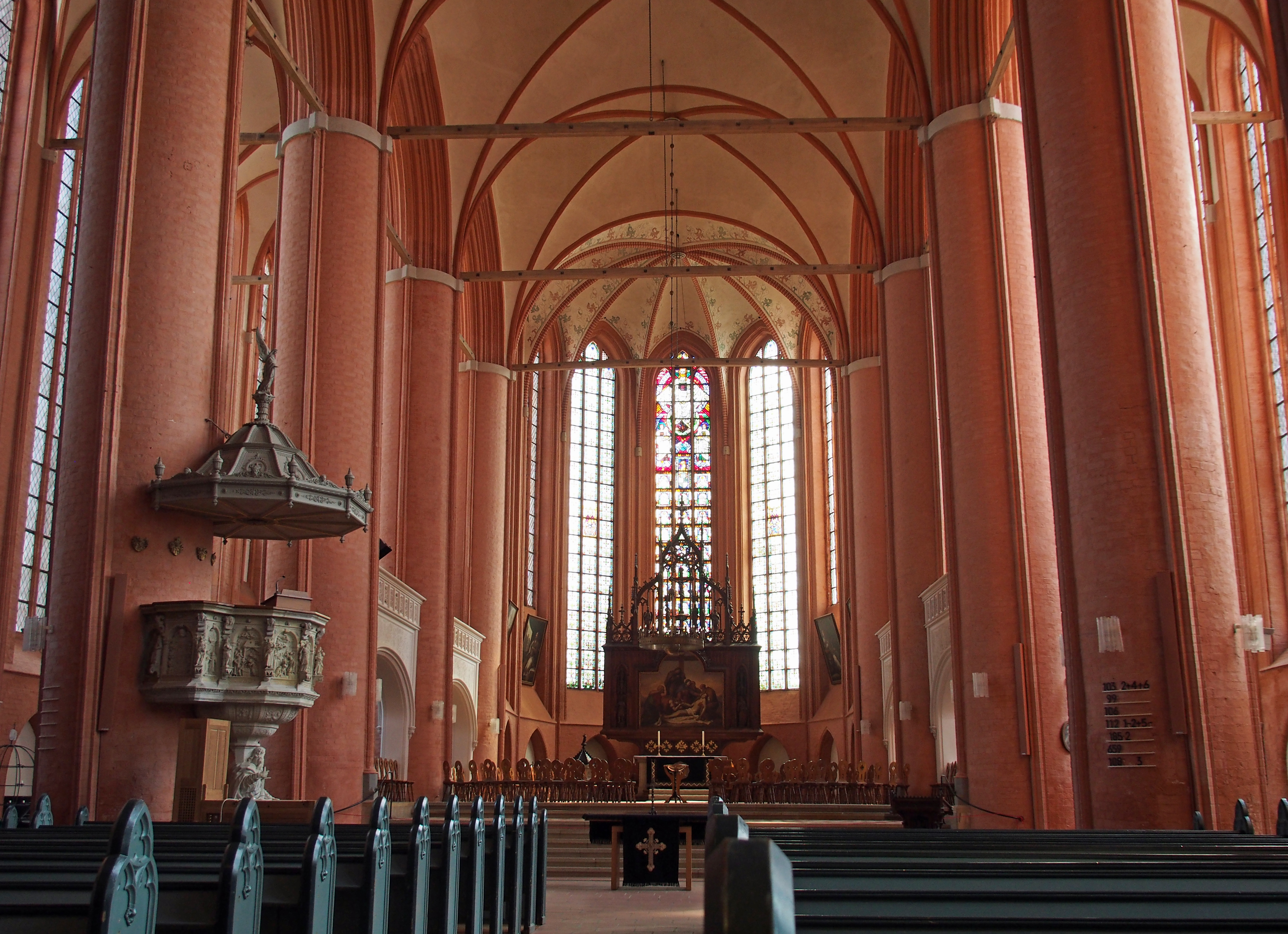 Langhaus und Altar St. Michaelis, Lüneburg